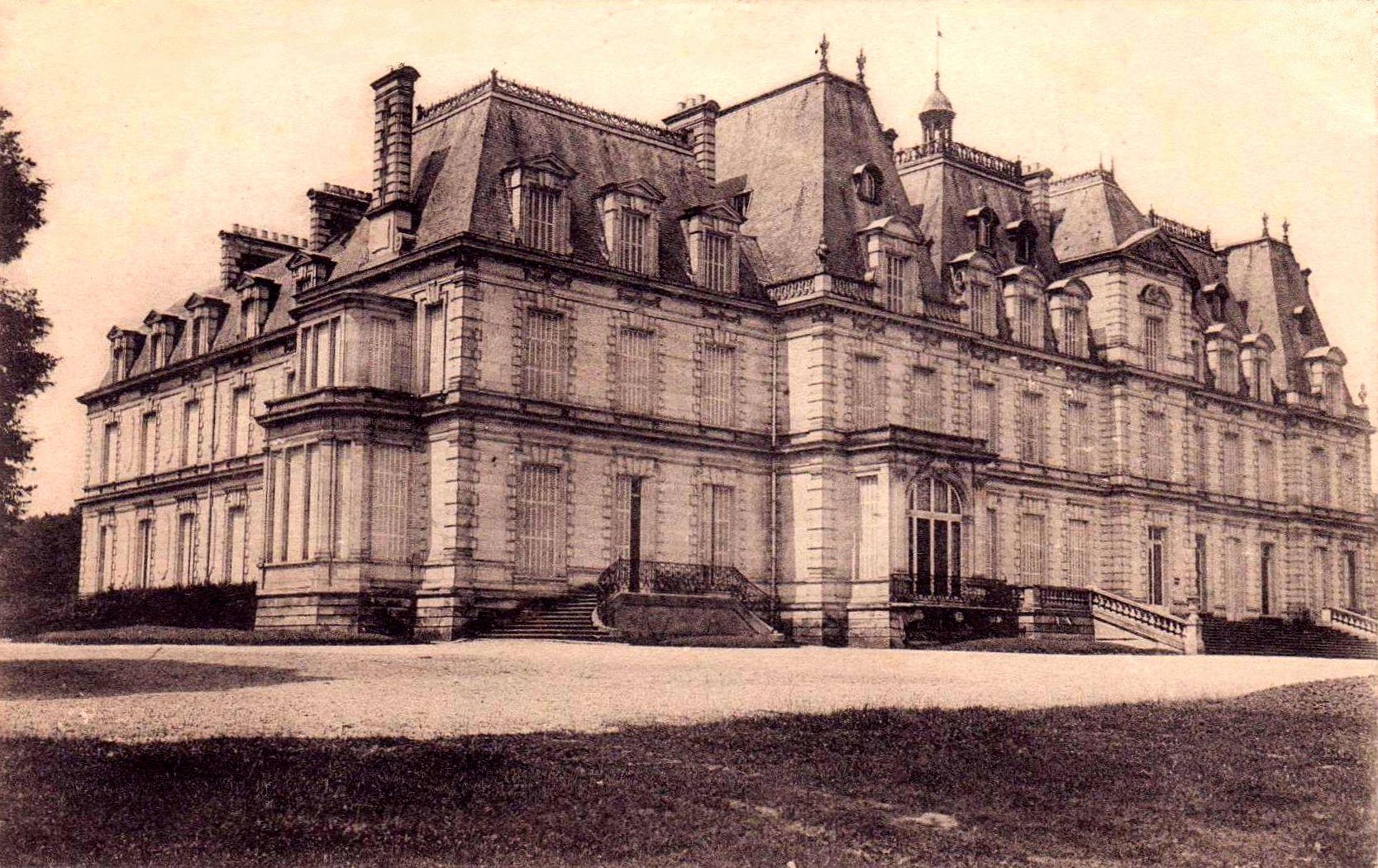 Façade est du château sur le parc.